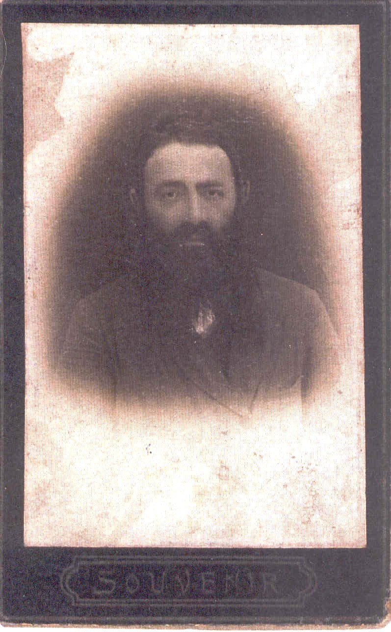 אהרון צ'צ'יק